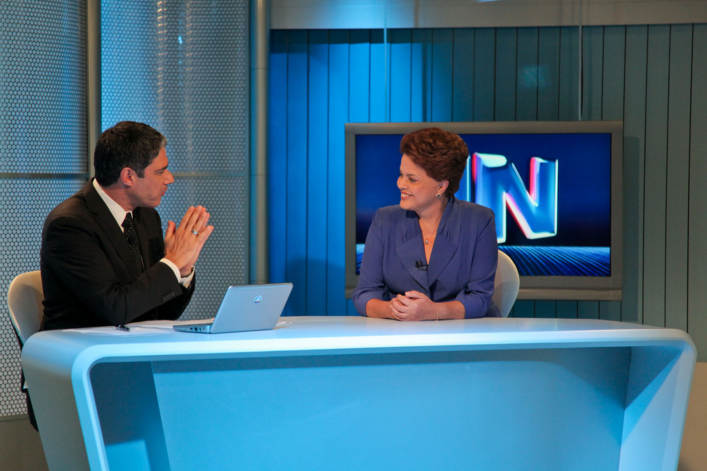 O jornalista brasileiro William Bonner entrevistando a então candidata à presidência da república, Dilma Rousseff, na bancada do Jornal Nacional.